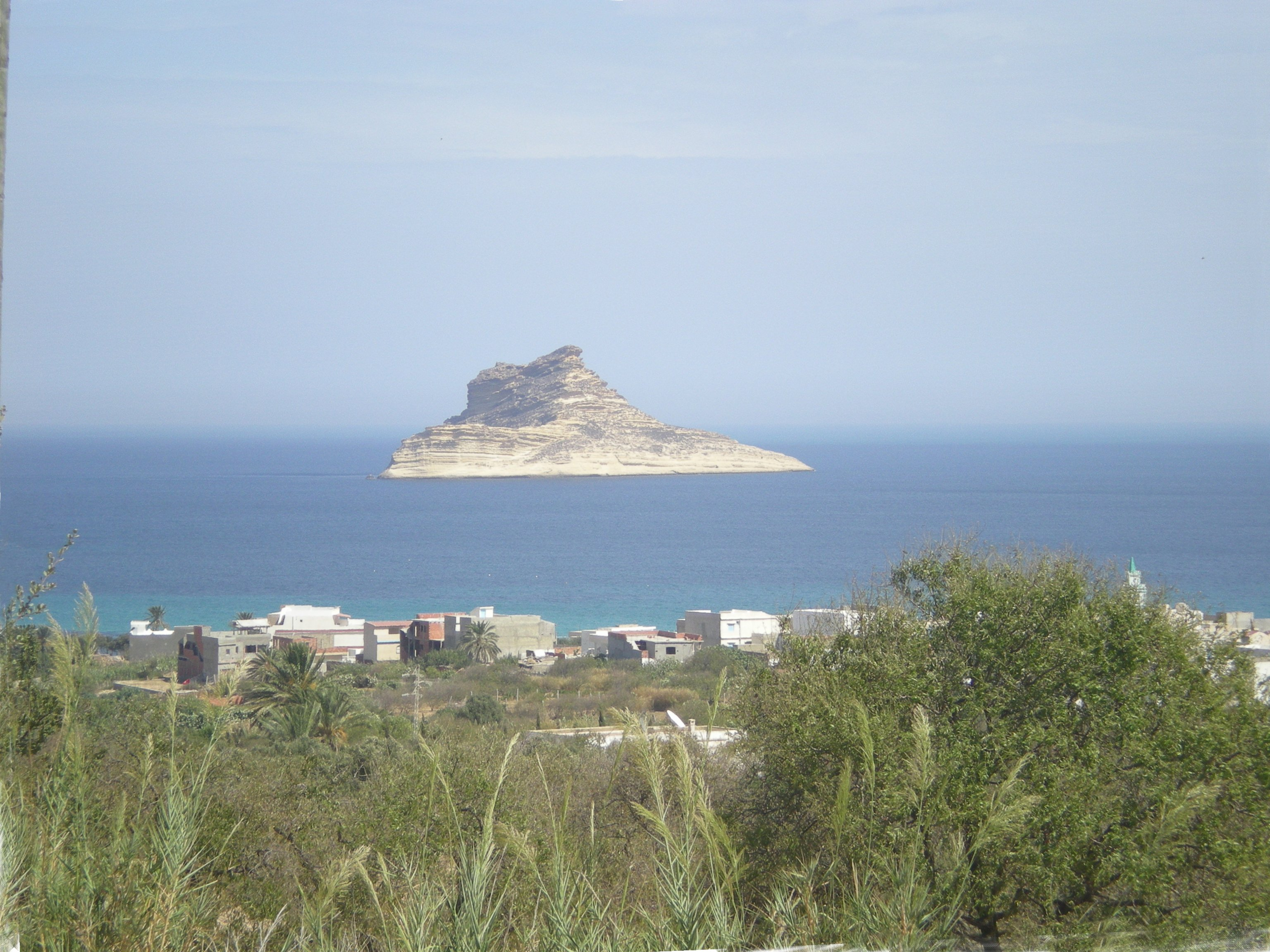 Ile Pilau, vue de rafraf plage, nord de Tunisie